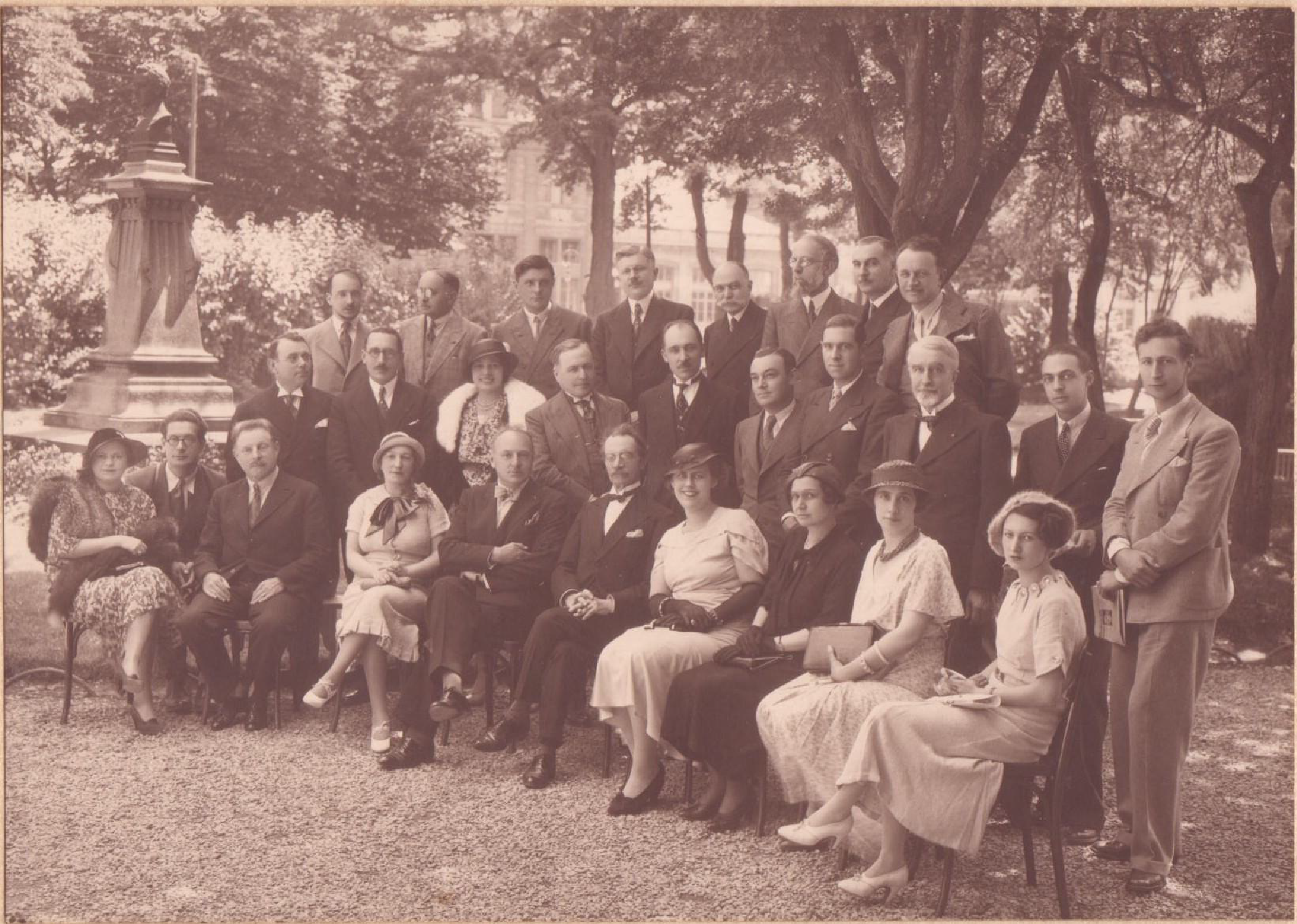 Emile Faynot, 3ème à droite rang du milieu, 1er juillet 1934